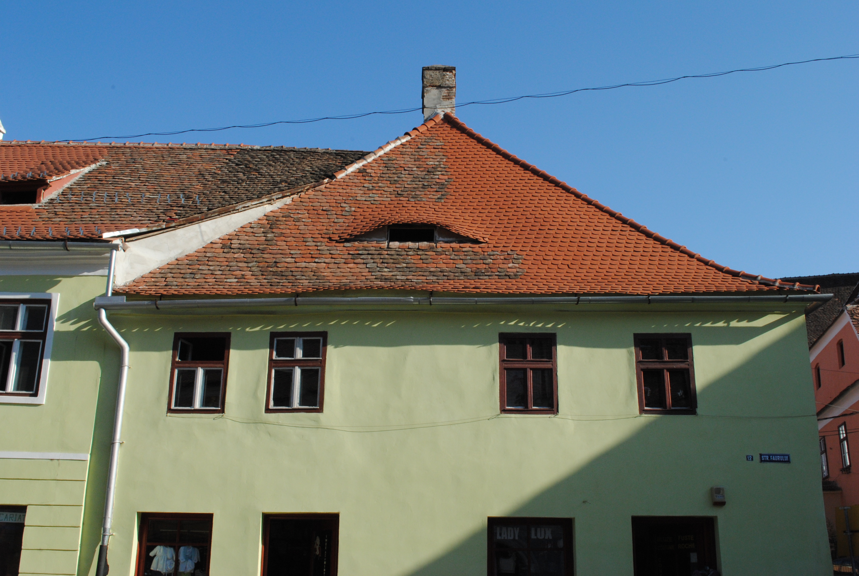 Casă, sec. XVI - XVII, sec. XVIII; prima jum. a sec. XX